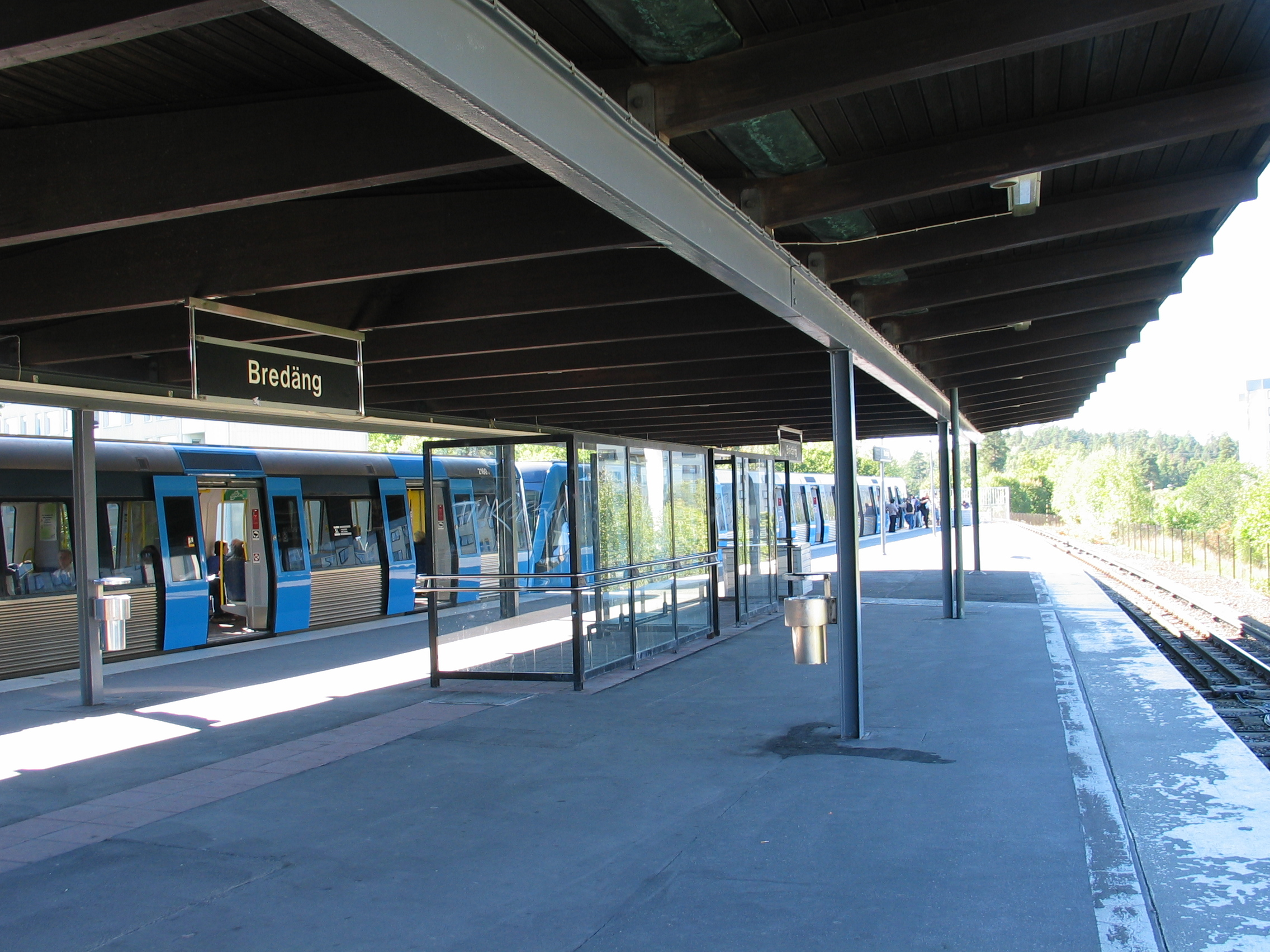 Bredäng, a metro station in Stockholm, Sweden.